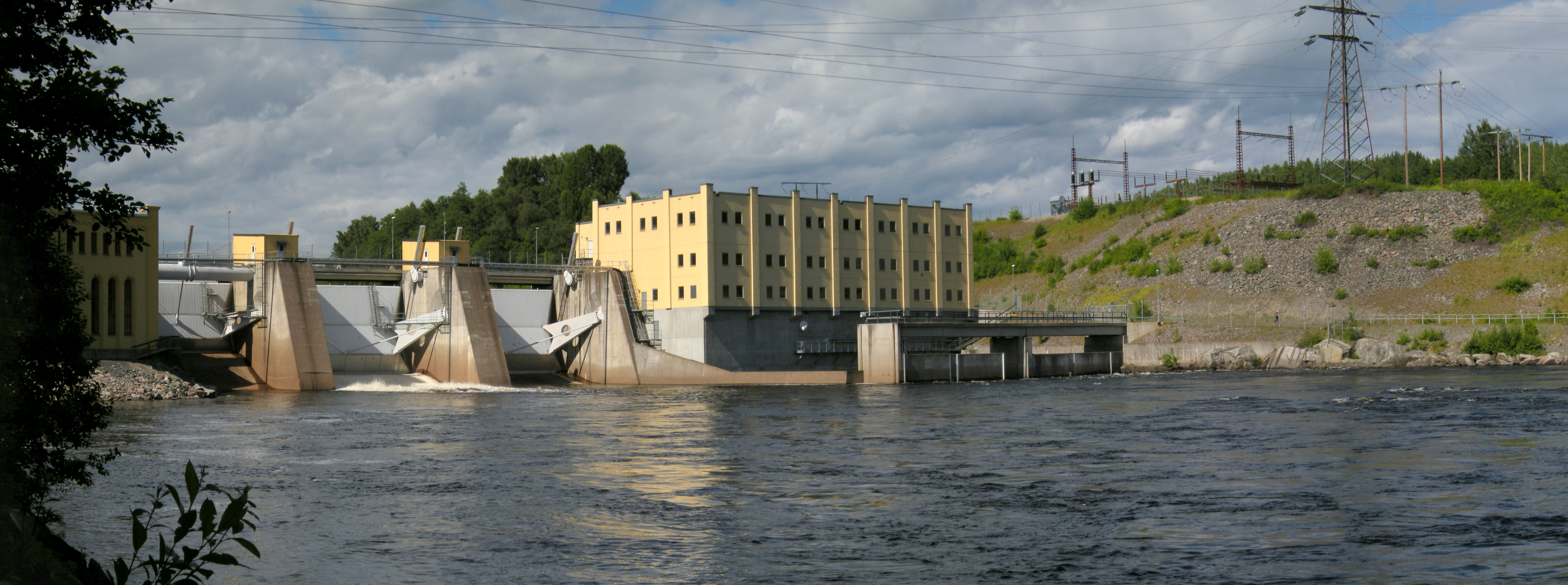 Bullerforsens kraftstation, Dalälven, Borlänge.